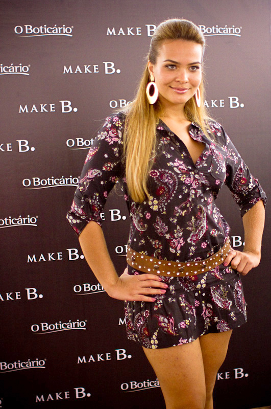 Geisy Arruda.